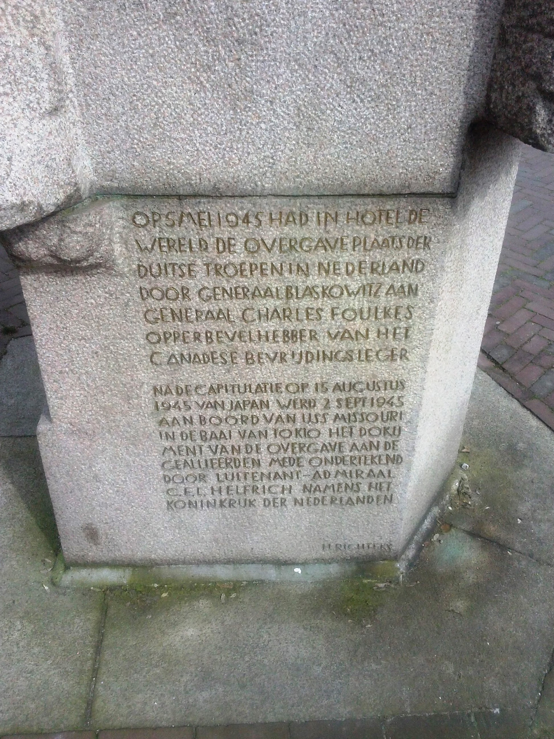 tekst op sokkel Nationaal Bevrijdingsmonument Wageningen - rechterkant.